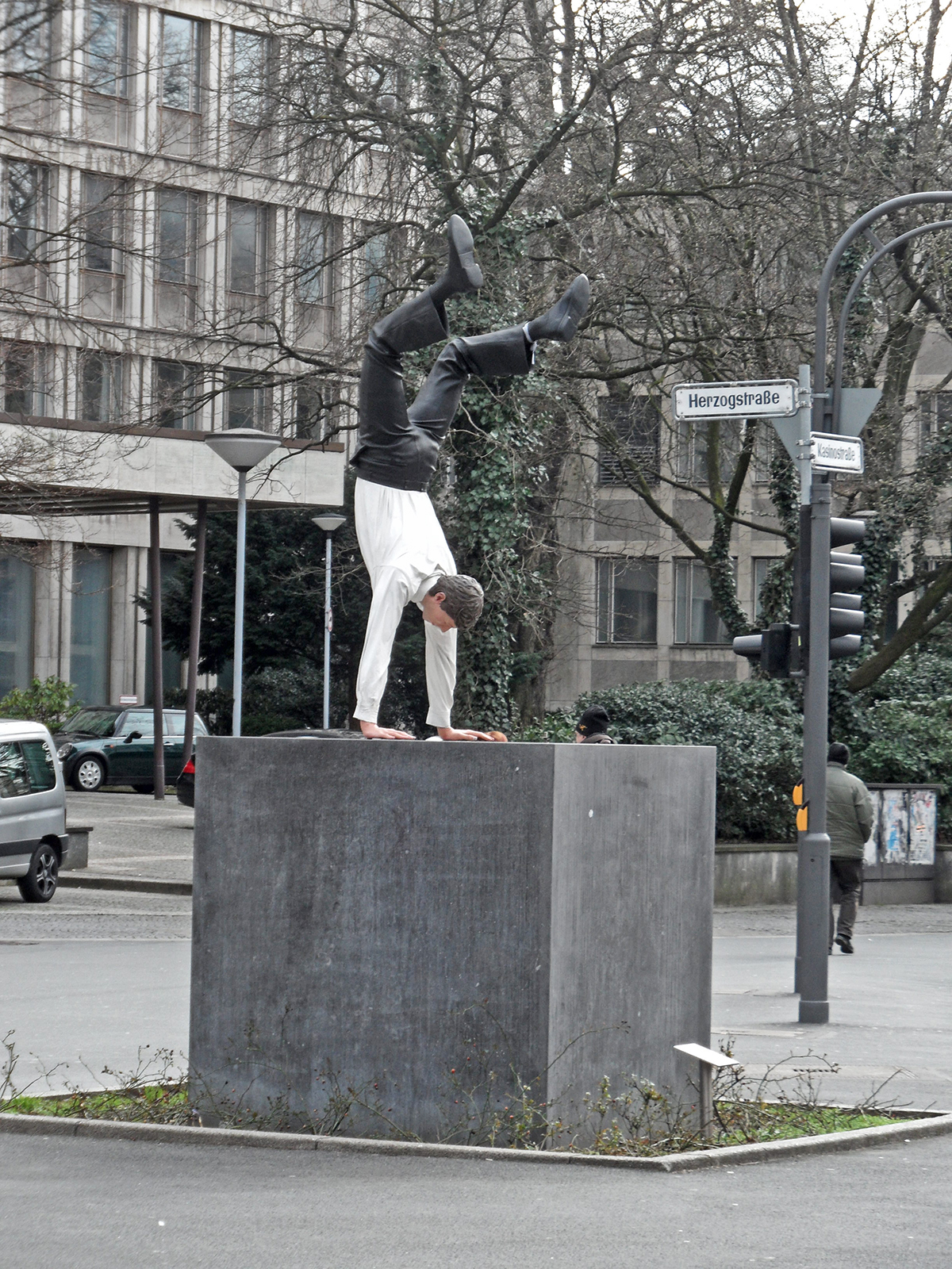 Skulptur "Ein neuer erfolgreicher Tag" des belgischen Künstlers Guillaume Bijl (2008) am sog. Kasinokreisel Herzog- Ecke Kasinostraße, Wuppertal-Elberfeld, Nordrhein-Westfalen, Februar 2016 Die Skulptur besteht aus Bronze, ist zwei Meter hoch, 220 kg schwer und steht auf einem 1,4 Meter hohen Sockel. Am Freitag den 22. August 2008 wurde das Kunstwerk eingeweiht. Schon kurz nach der Einweihung wurde die bronzene Krawatte, die dem Handstandmann vom Hals hing, zum ersten Mal gewaltsam entfernt. Schließlich wurden auch die Nachfolgemodelle entfernt und von Zeit zu Zeit durch echte Krawatten ergänzt, was der Figur dem Spitznamen „Krawattenmann“ zutrug. Auch der mehr als 60 kg schwere Aktenkkoffer aus Bronze wurde mehrfach gestohlen (er fehlt auch auf meinem Foto), bis er im Sommer 2016 durch einen Koffer aus Epoxidharz mit eingegossener Stahlkonstruktion ersetzt wurde, der für Metalldiebe wertlos ist.